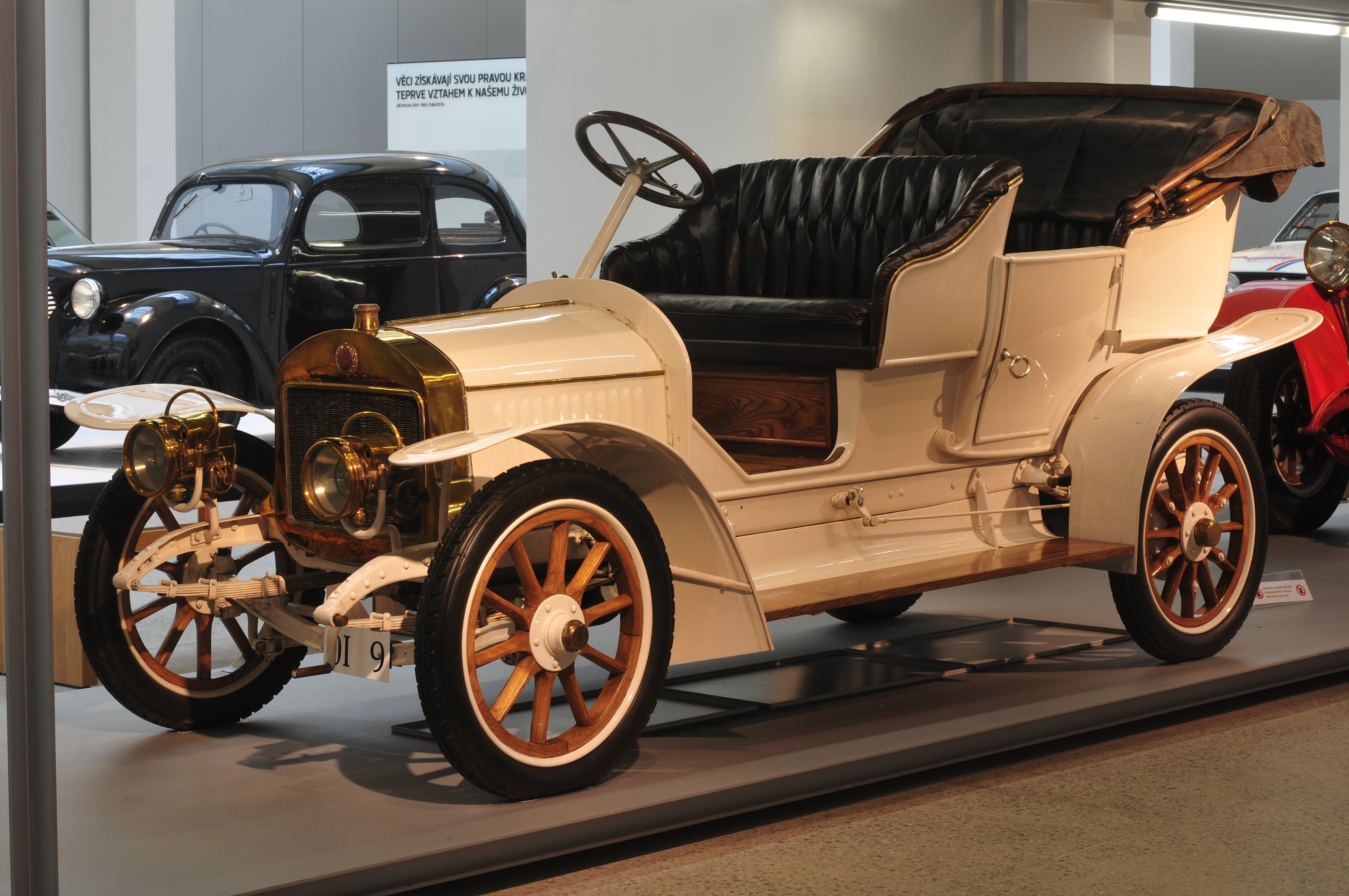 Fototermin Škoda Museum Mladá Boleslav 2013 Fototermin Škoda Muzeum 5. April 2013 in Mladá Boleslav This work is free and may be used by anyone for any purpose. If you wish to use this content, you do not need to request permission as long as you follow any licensing requirements mentioned on this page.